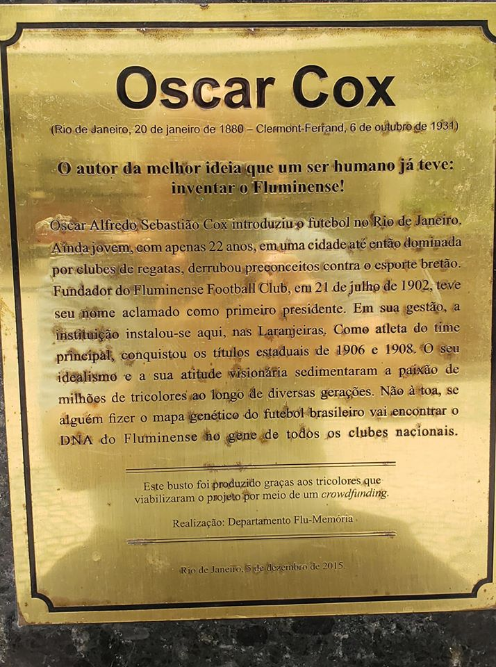 Placa em homenagem à Oscar Cox colocada em seu busto, principal fundador do Fluminense Football Club, exposta na sede do clube.